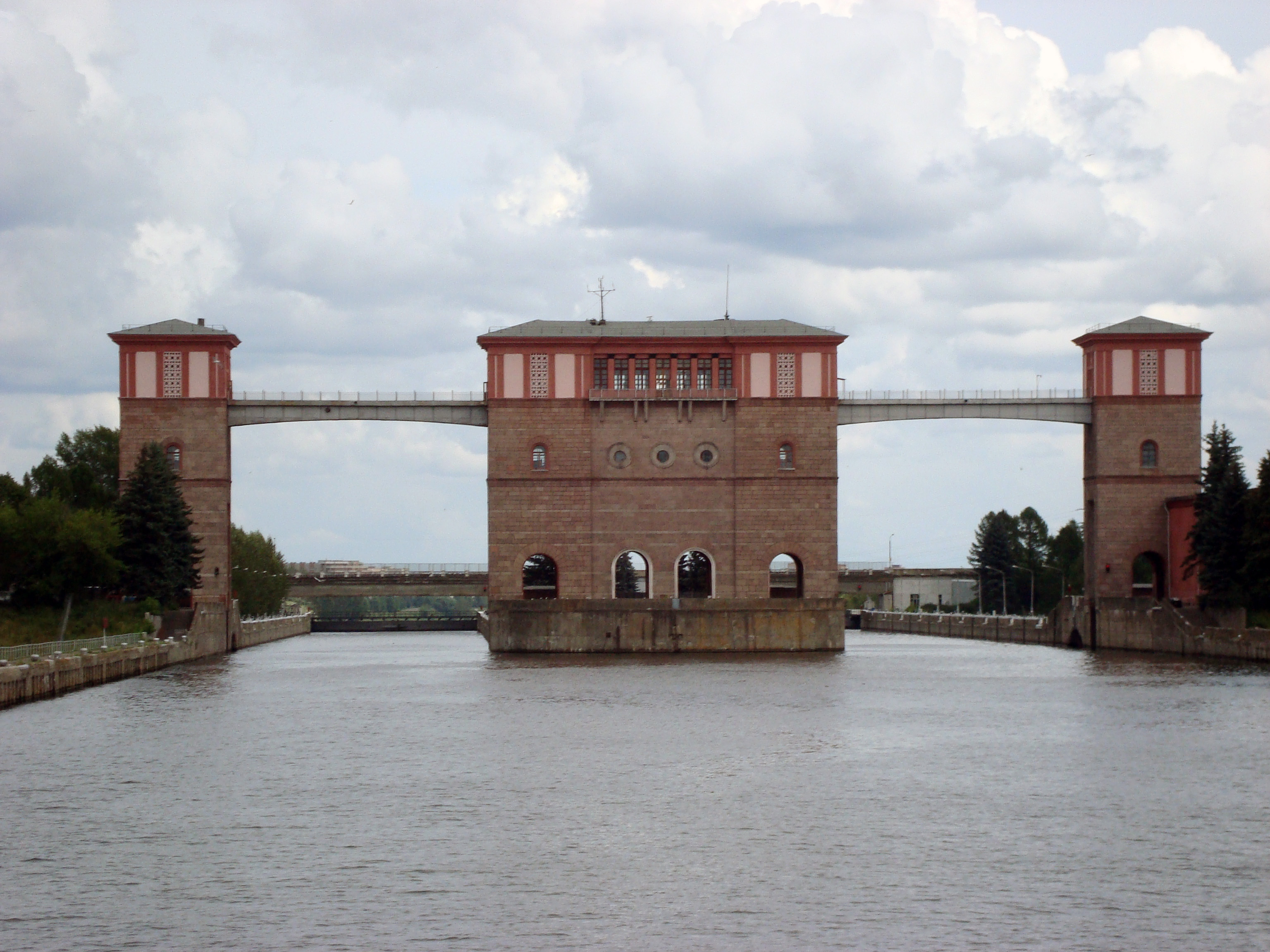 Шлюзы: Рыбинск, Ярославская область